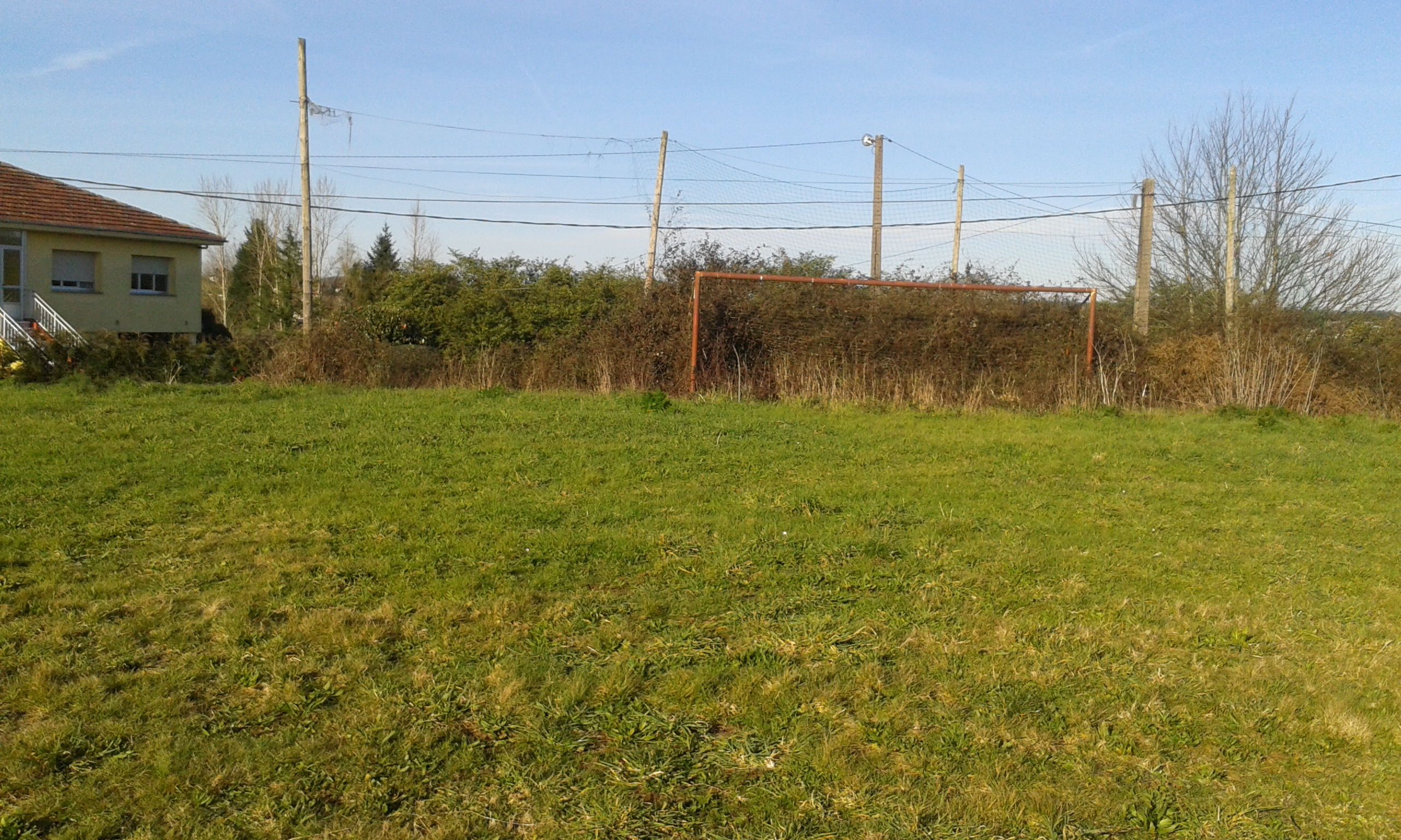 Campo situado en "O Valado"